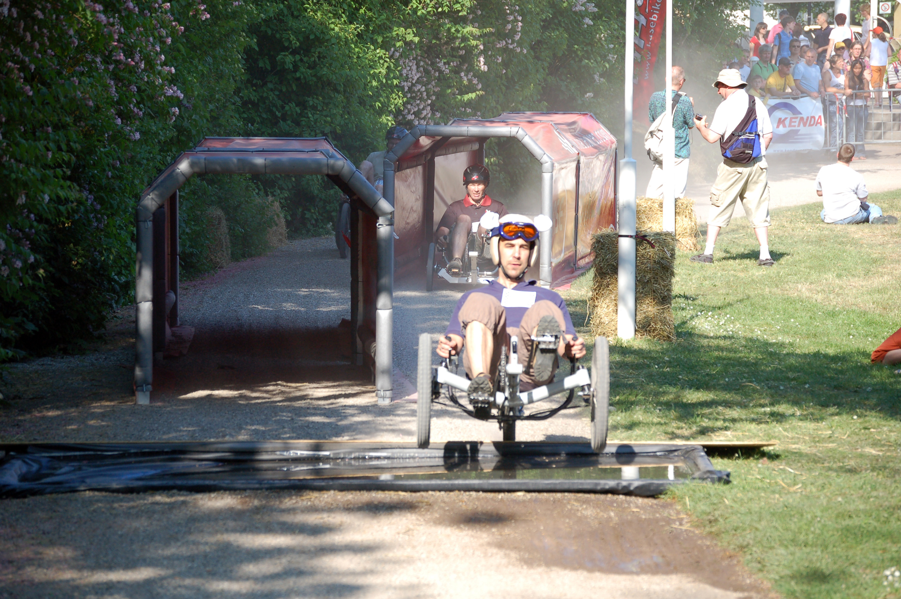 Spezialradmesse 2007, Trikerennen